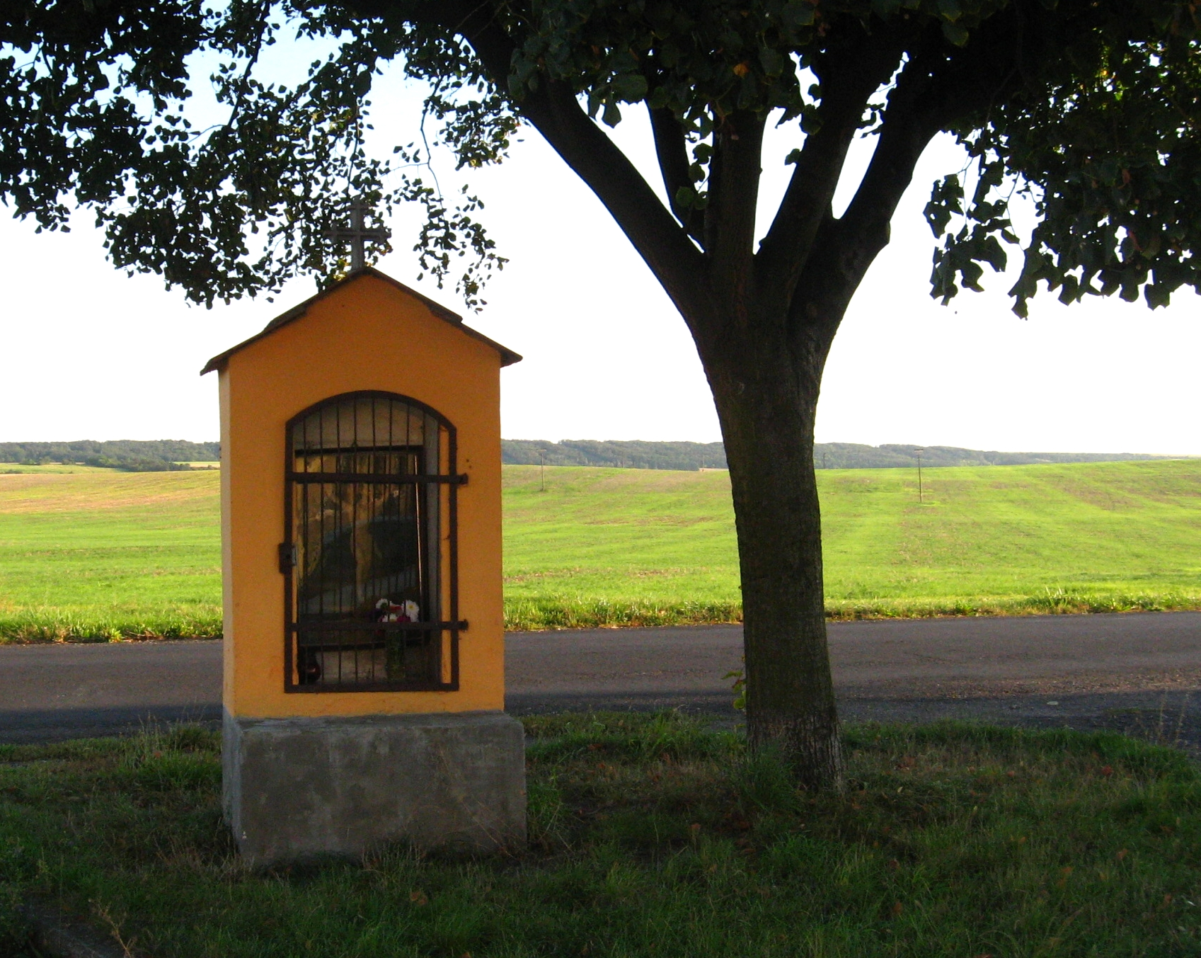 Kaplička na křižovatce silnic na jižním okraji Radonic